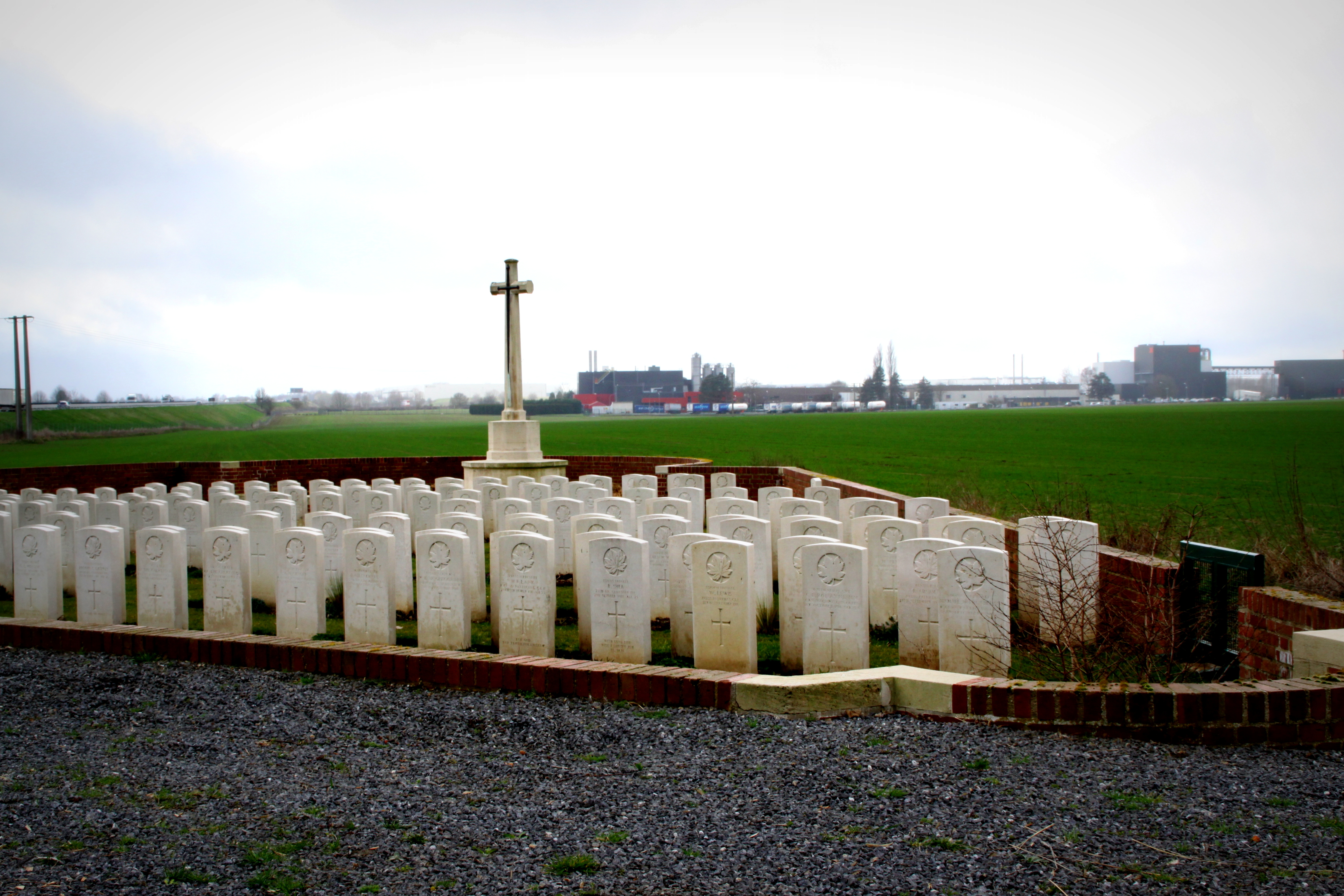 Kanadeschen Zaldotekierfecht zu Tilloy-lez-Cambrai